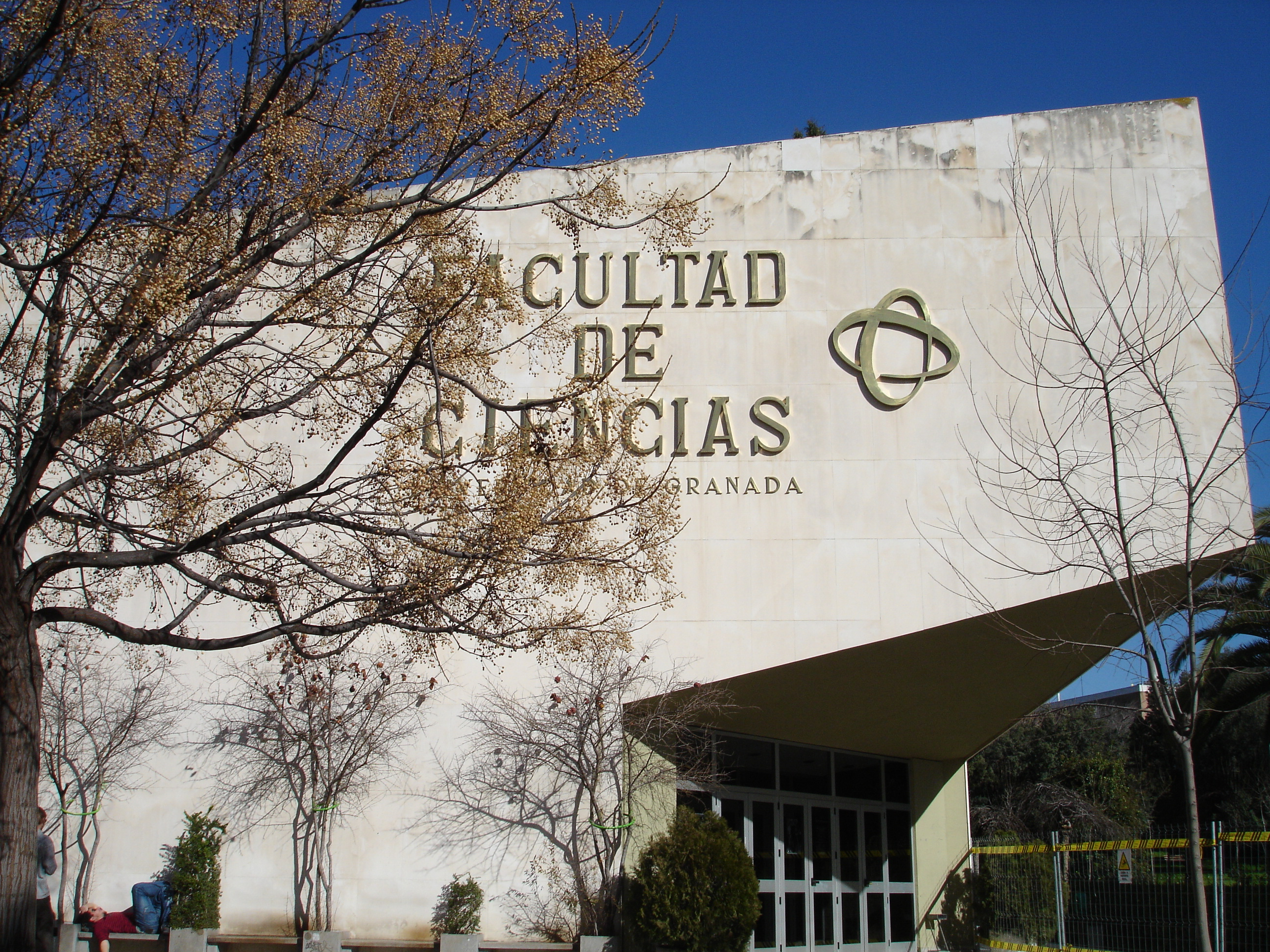 Fachada Facultad de Ciencias de Granada. Puerta principal